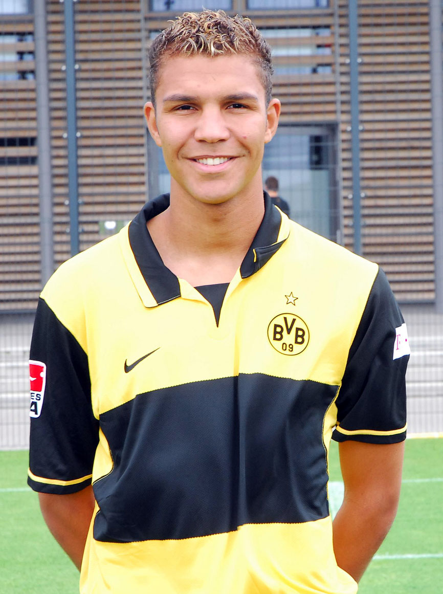 Daniel Gordon